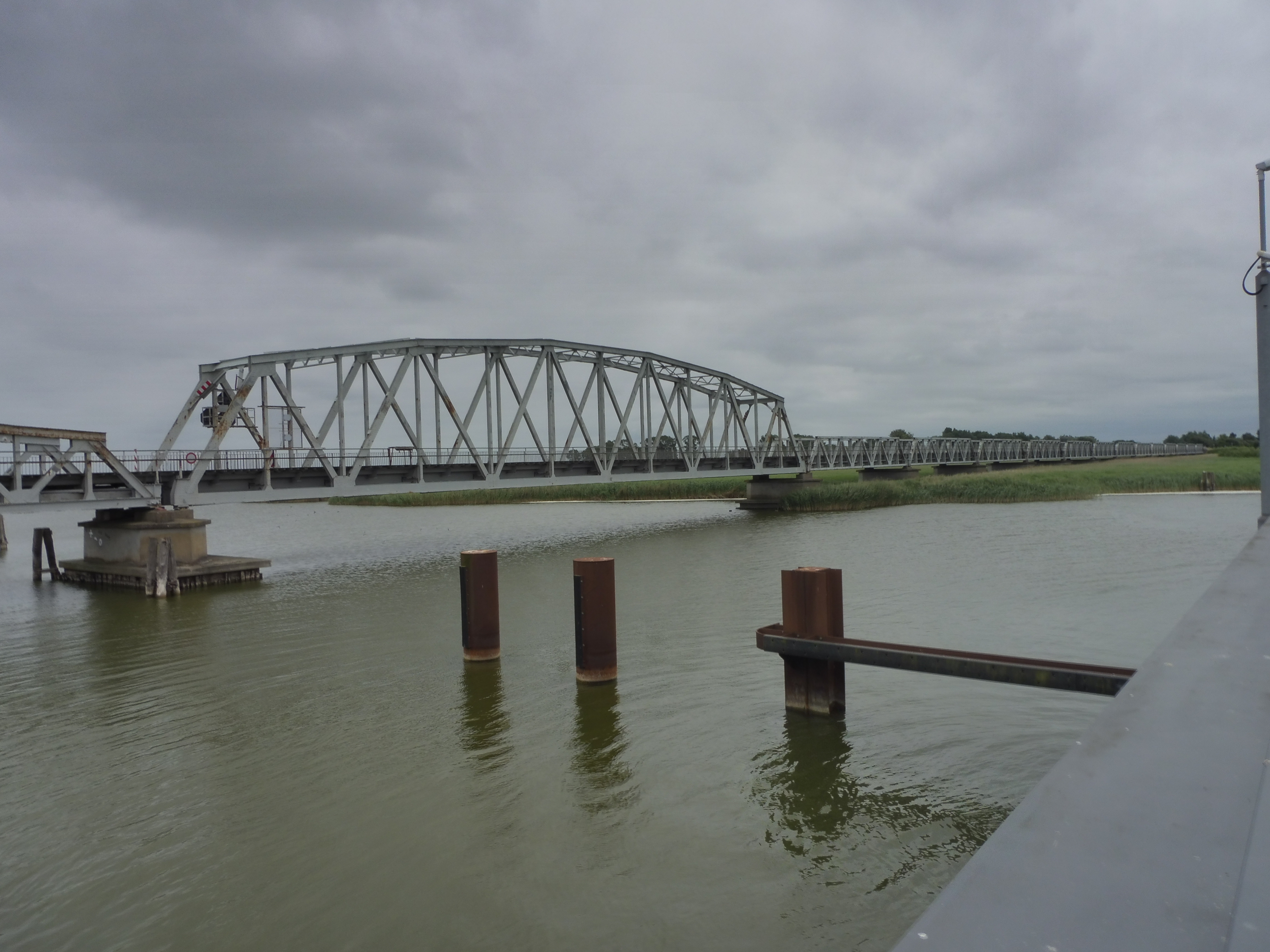 Meiningenbrücke südlich der Drehbrücke